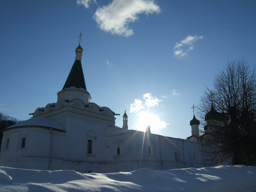 Печерский_Монастырь.Зима.На переднем плане - Успенская Церковь (восстановление начато по сути дела в 2005 г).На заднем плане - Вознесенский Собор